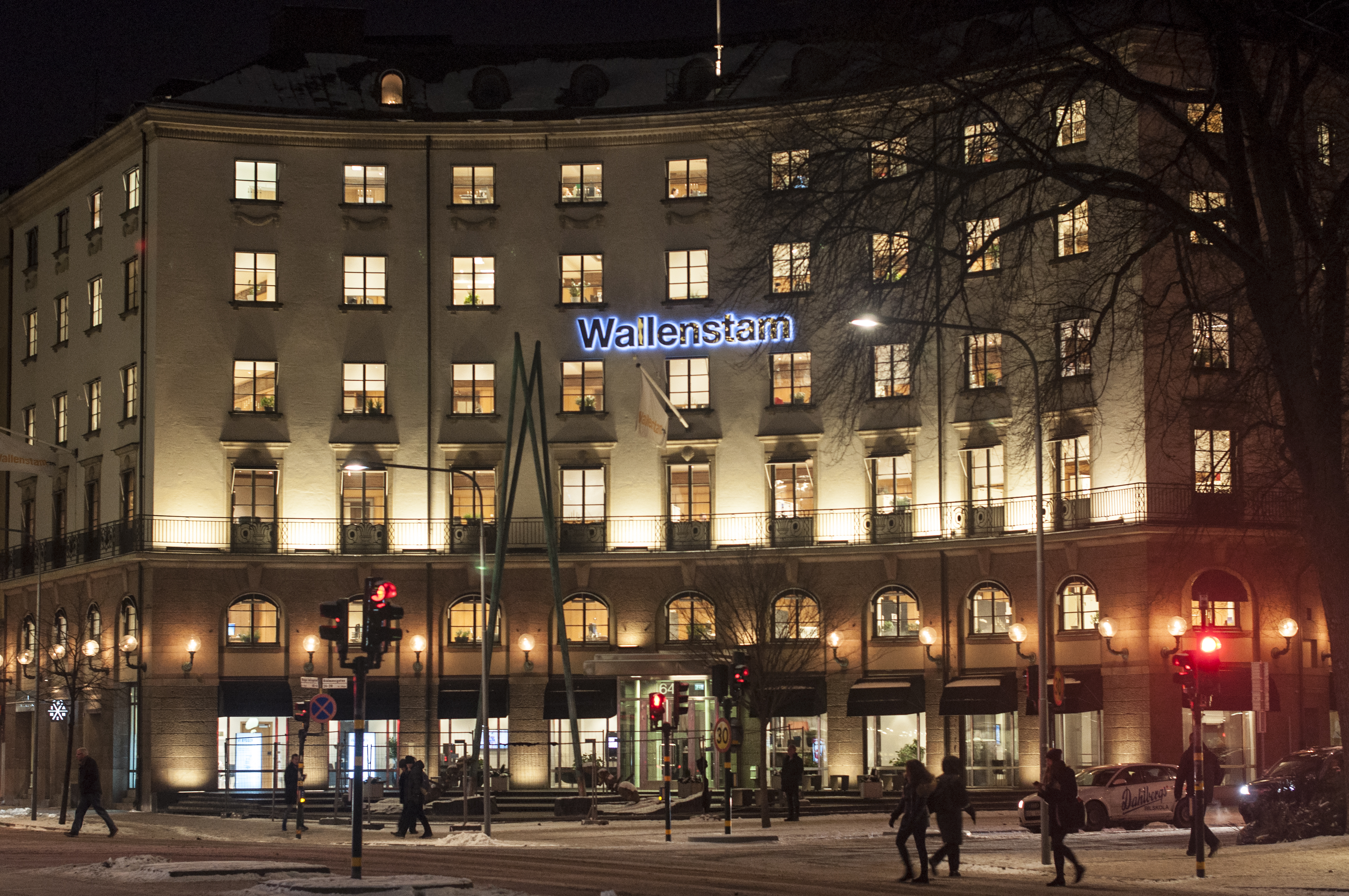 Wallenstams lokaler i Shellhuset, Birger Jarlsgatan